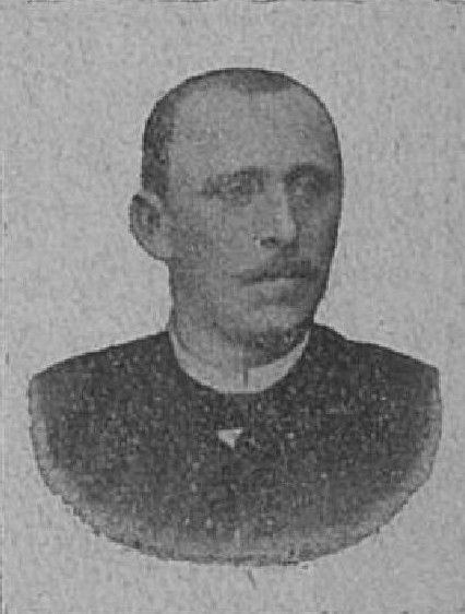 Josef Mareš (1860-1925), rakouský a český rolník a politik